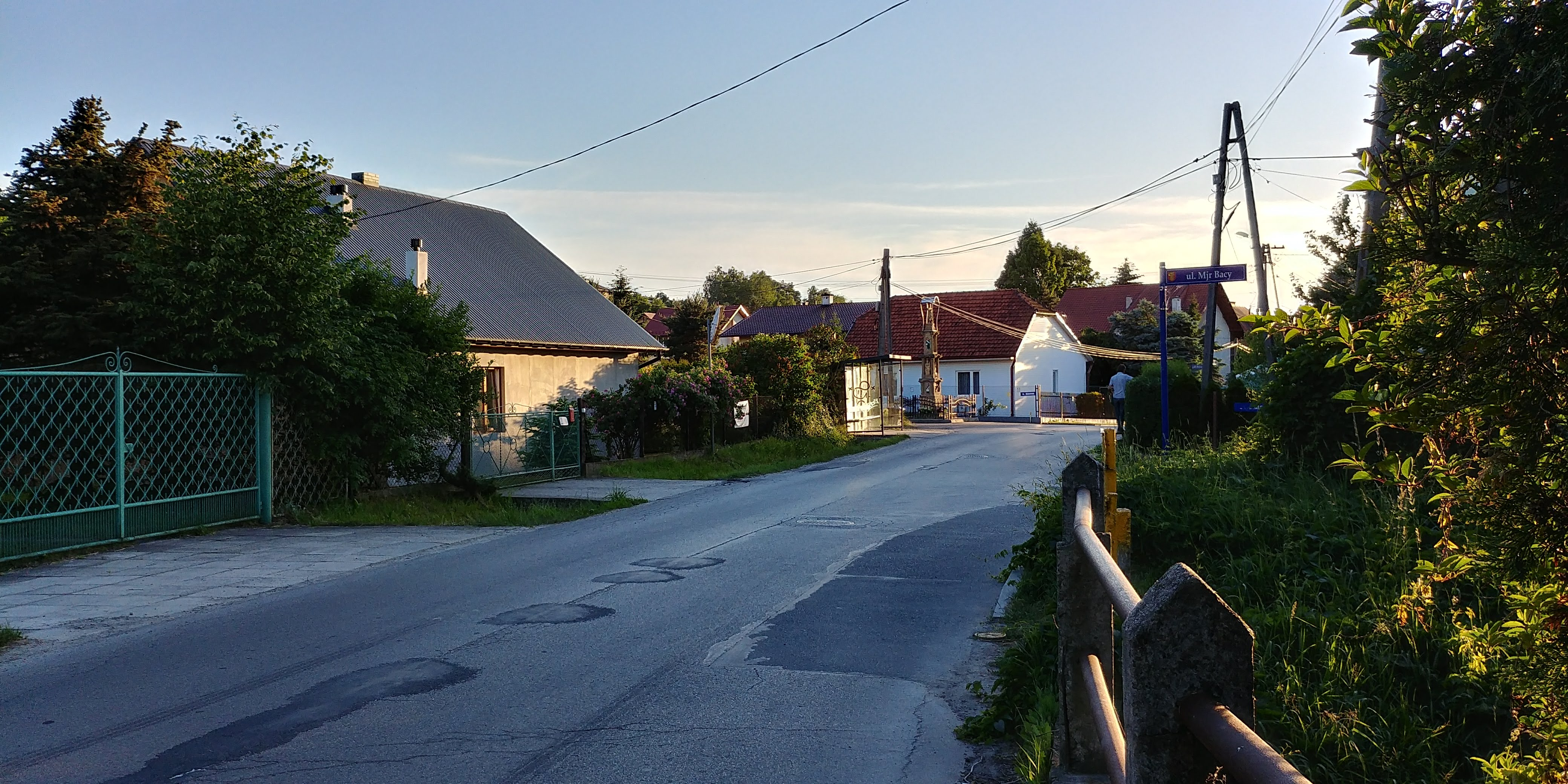 ulica Chodenicka w Bochni.